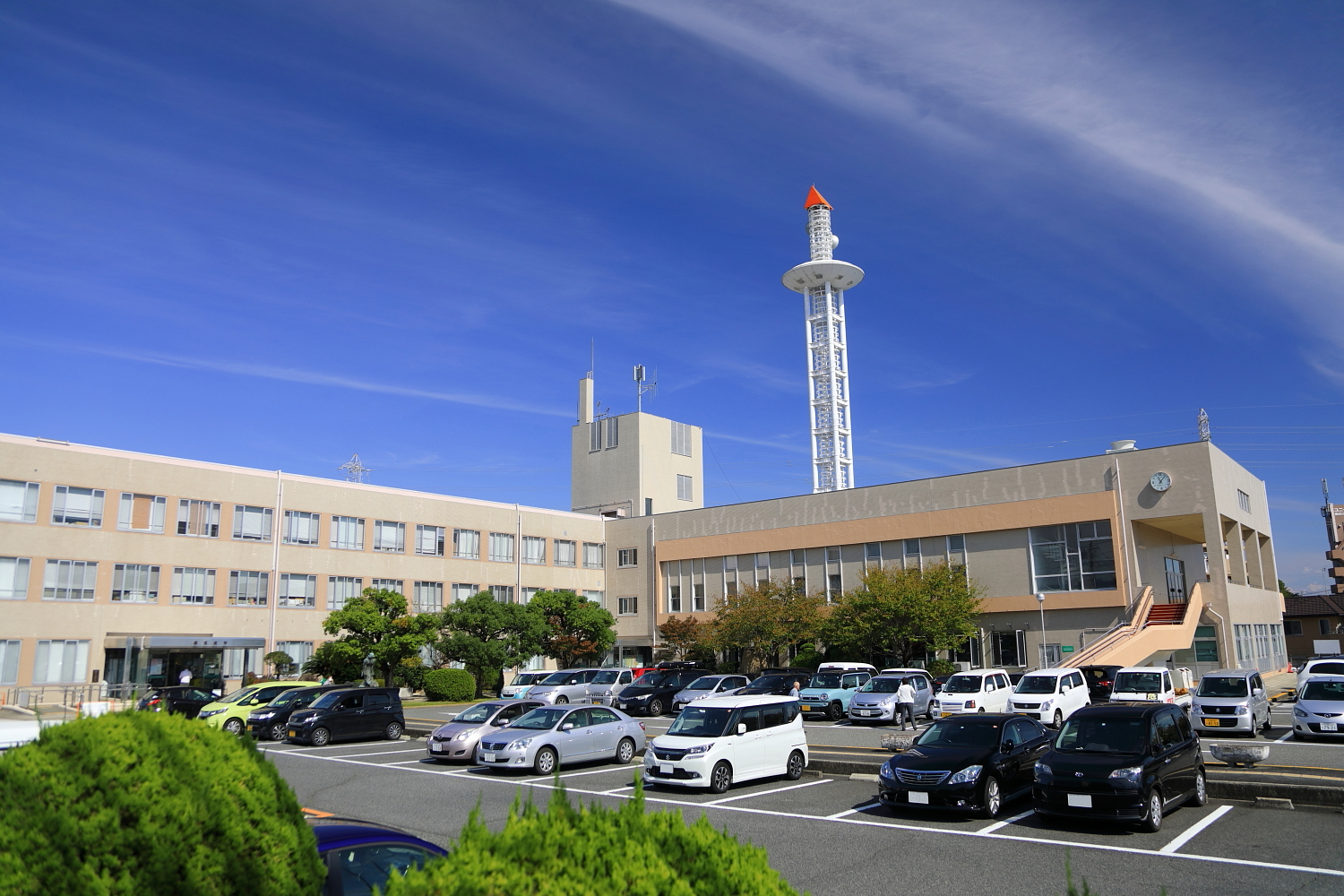 名古屋市緑区役所（2018年（平成30年）10月）